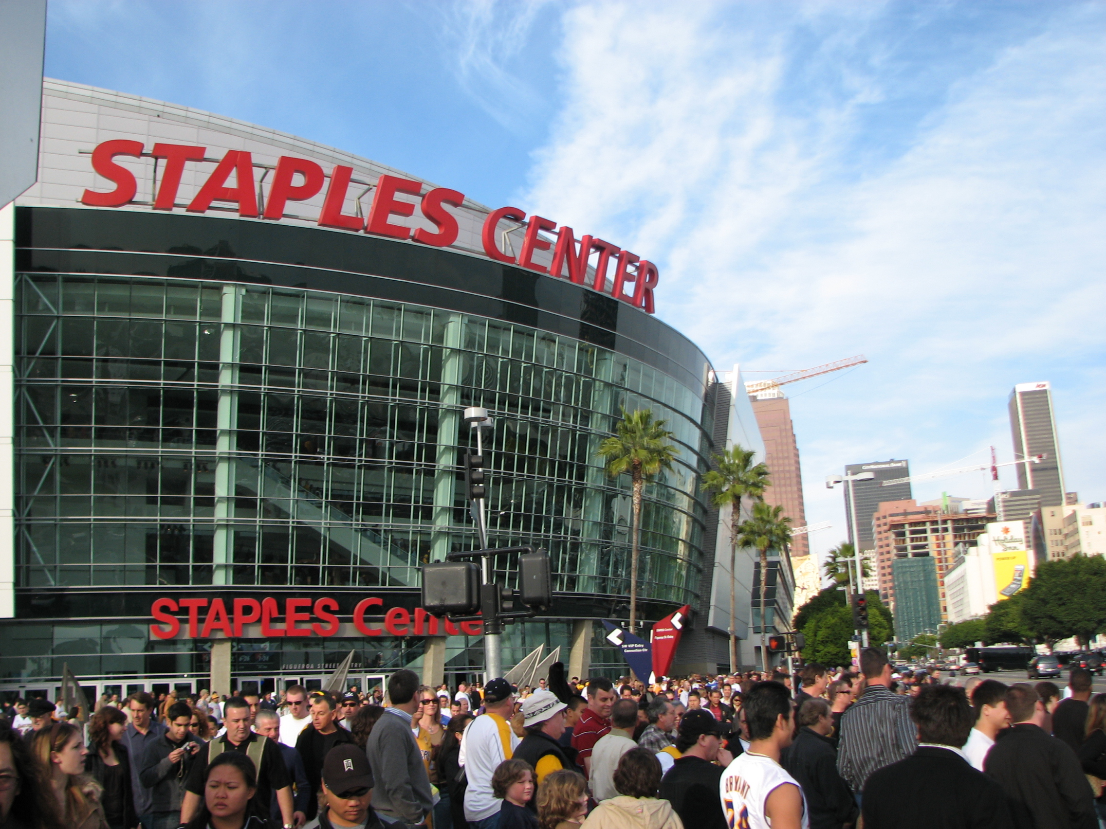 game over :-(